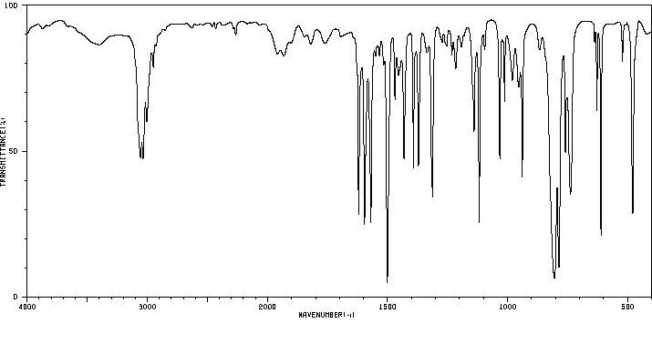 IR-Spekrum von Chinolin (Film)